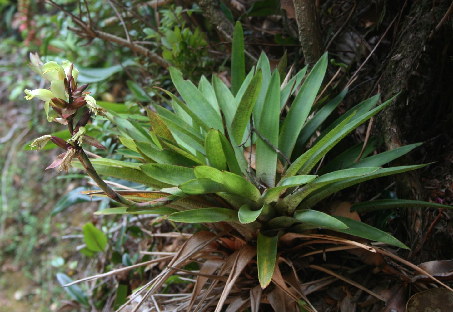 Vriesea williamsii (= Werauhia williamsii), Bromeliengewächse (Bromeliaceae) - Costa Rica: Prov. Alajuela, Parque Nacional Volcán Poás, 2550-2600 m